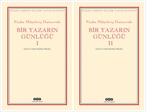 Kitabın kapağı